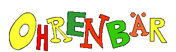 Logo der Sendung Ohrenbär